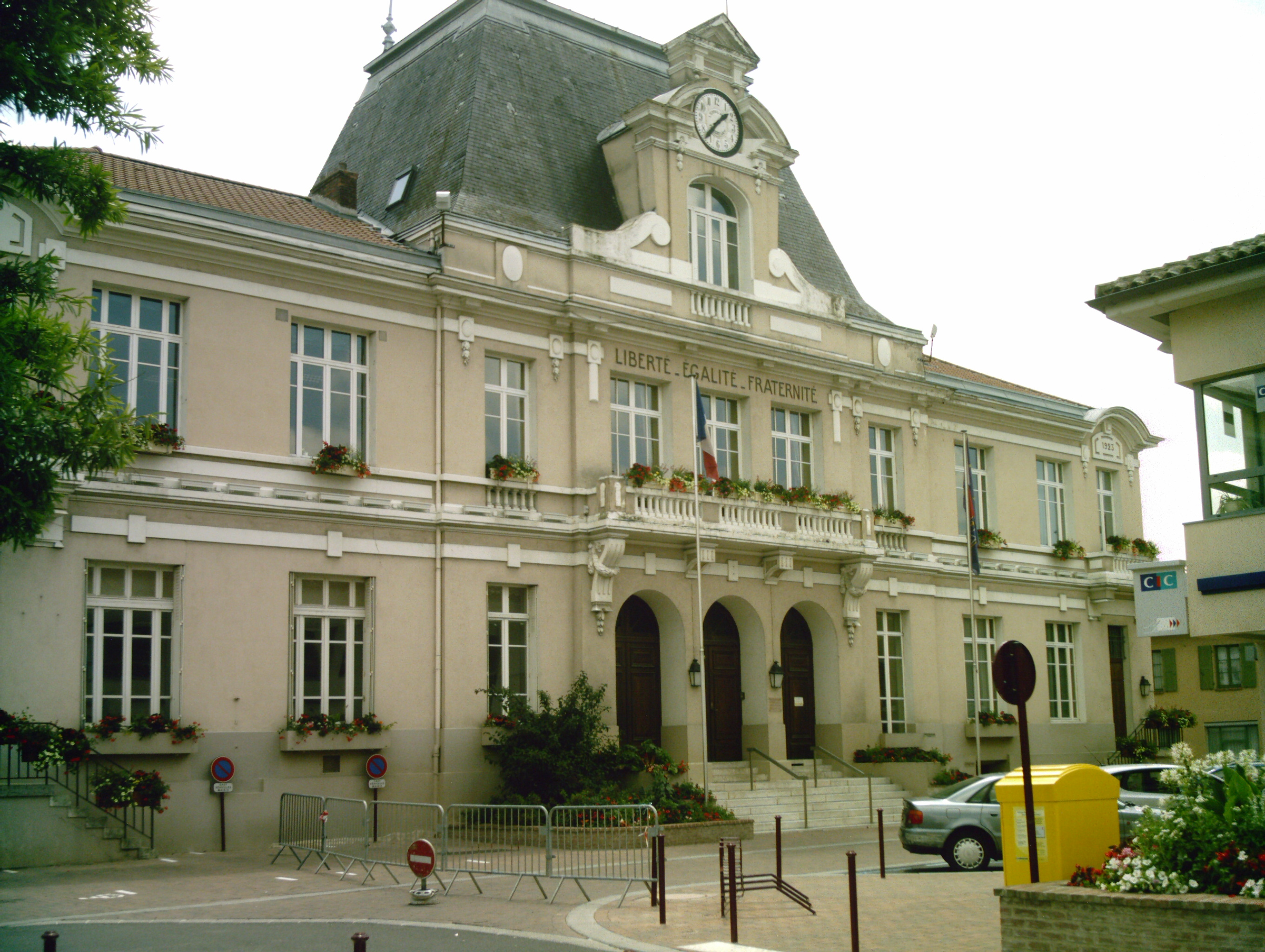 L'hôtel de ville de Châtillon-sur-Chalaronne (Ain, FRANCE)